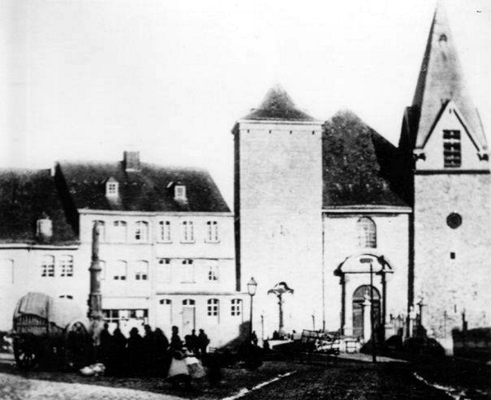 Ansicht der Sankt Nikolauskirche in Eupen vor dem Ausbau der Türme um 1880